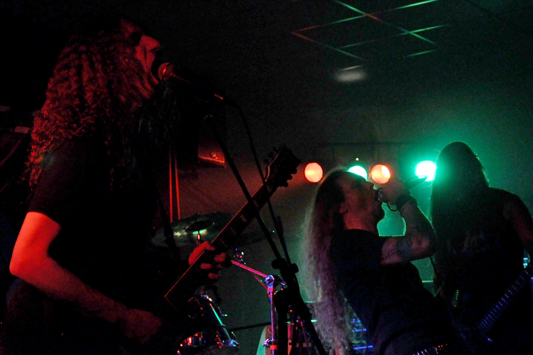 Vorkreist en concert à Vesoul, le 25/04/09. Vorkreist est un groupe de Death/Black Metal originaire de Paris.